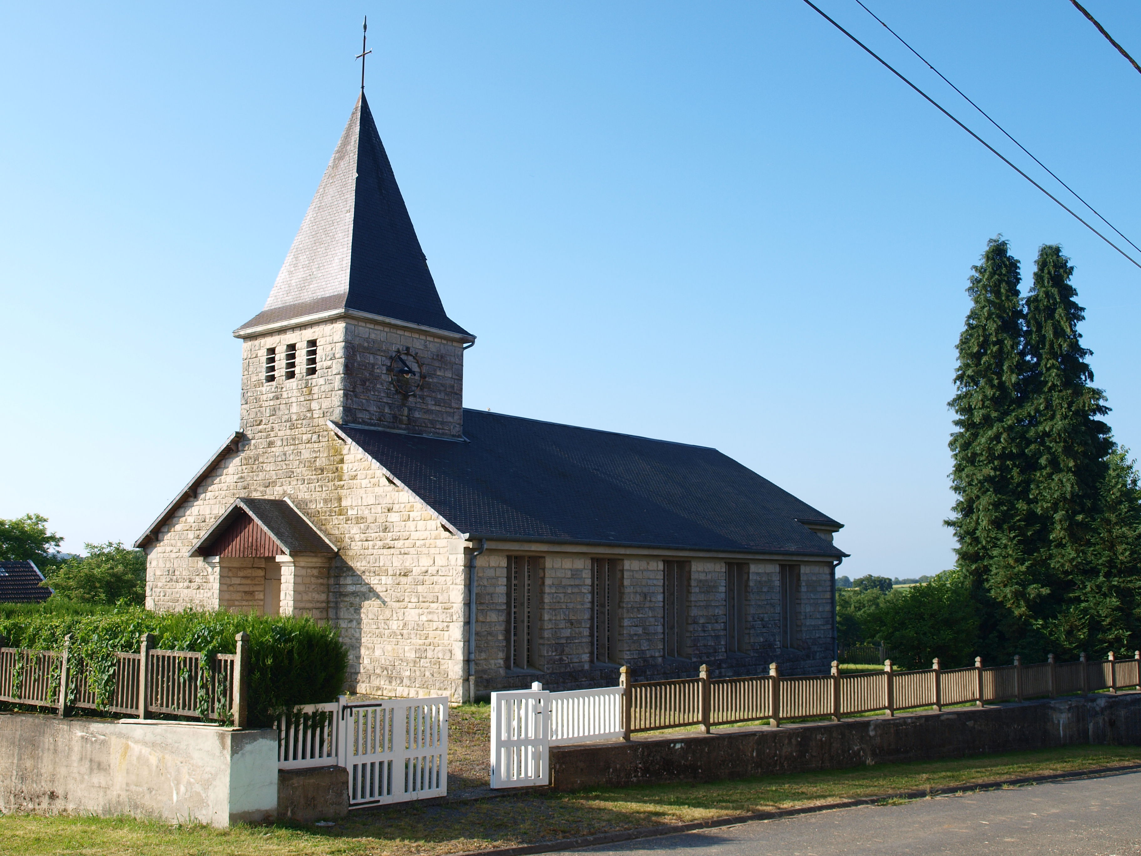 La Berlière (Ardennes, France) ; église